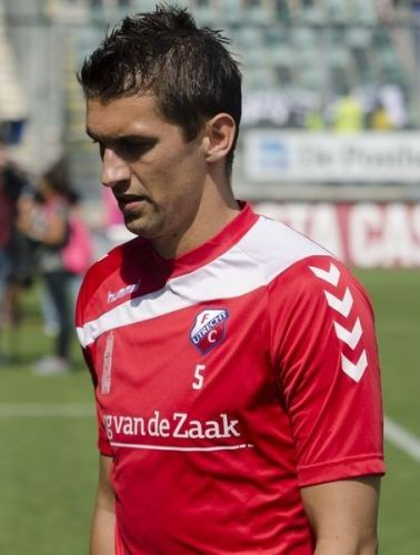 Christian Kum